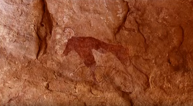 arte rupestre en el documental